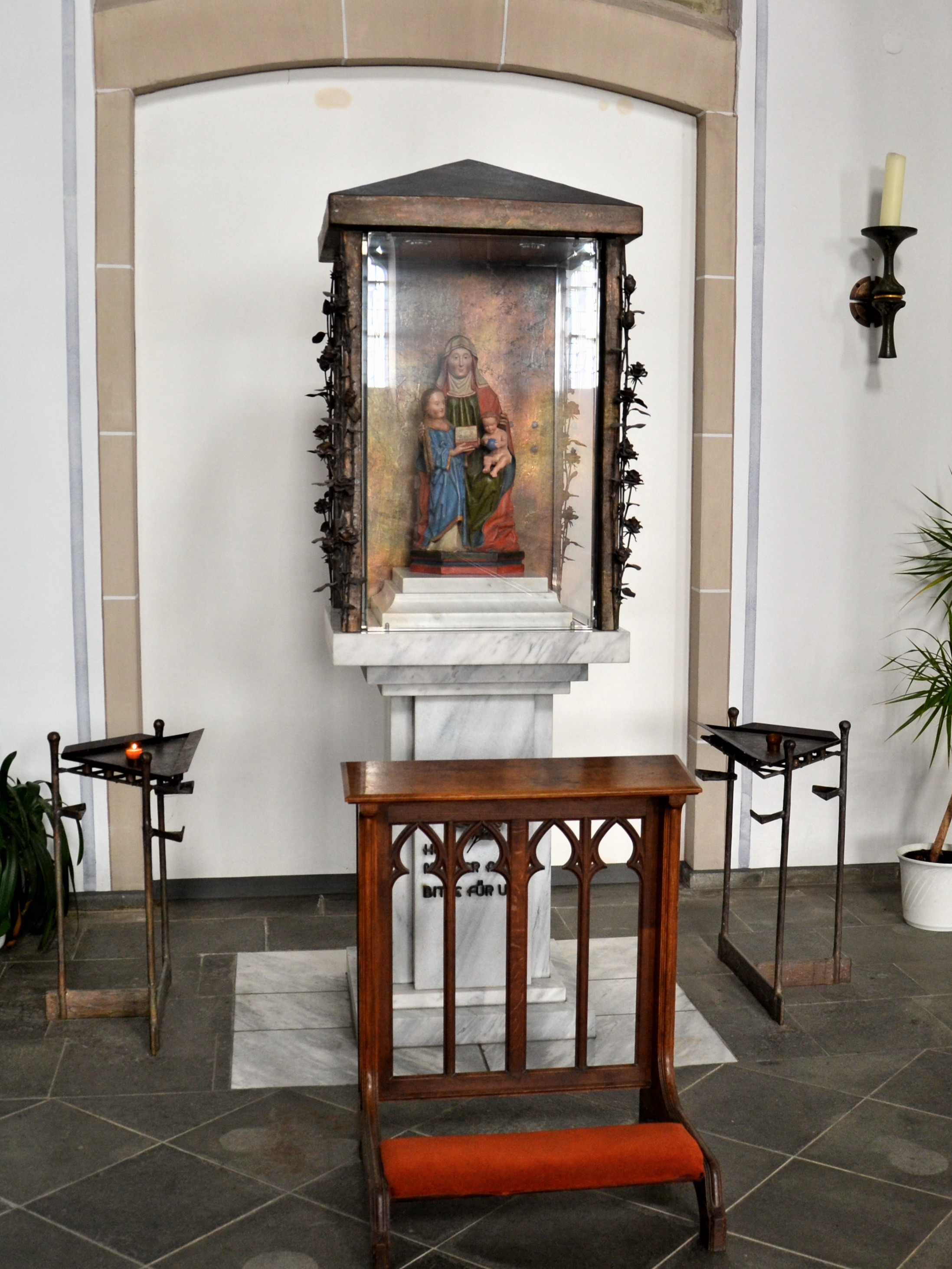 St. Hubertus-Kirche in Essen-Bergerhausen, unter Denkmalschutz, Holzplastik "hl. Anna Selbdritt"This is a photograph of an architectural monument., no. 104